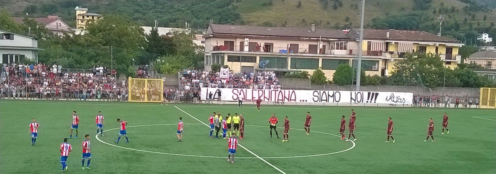 Partita amichevole tra Salernitana e Olimpic Salerno sul campo di Baronissi, il 24 agosto 2014, finita 13-0 per la Salernitana